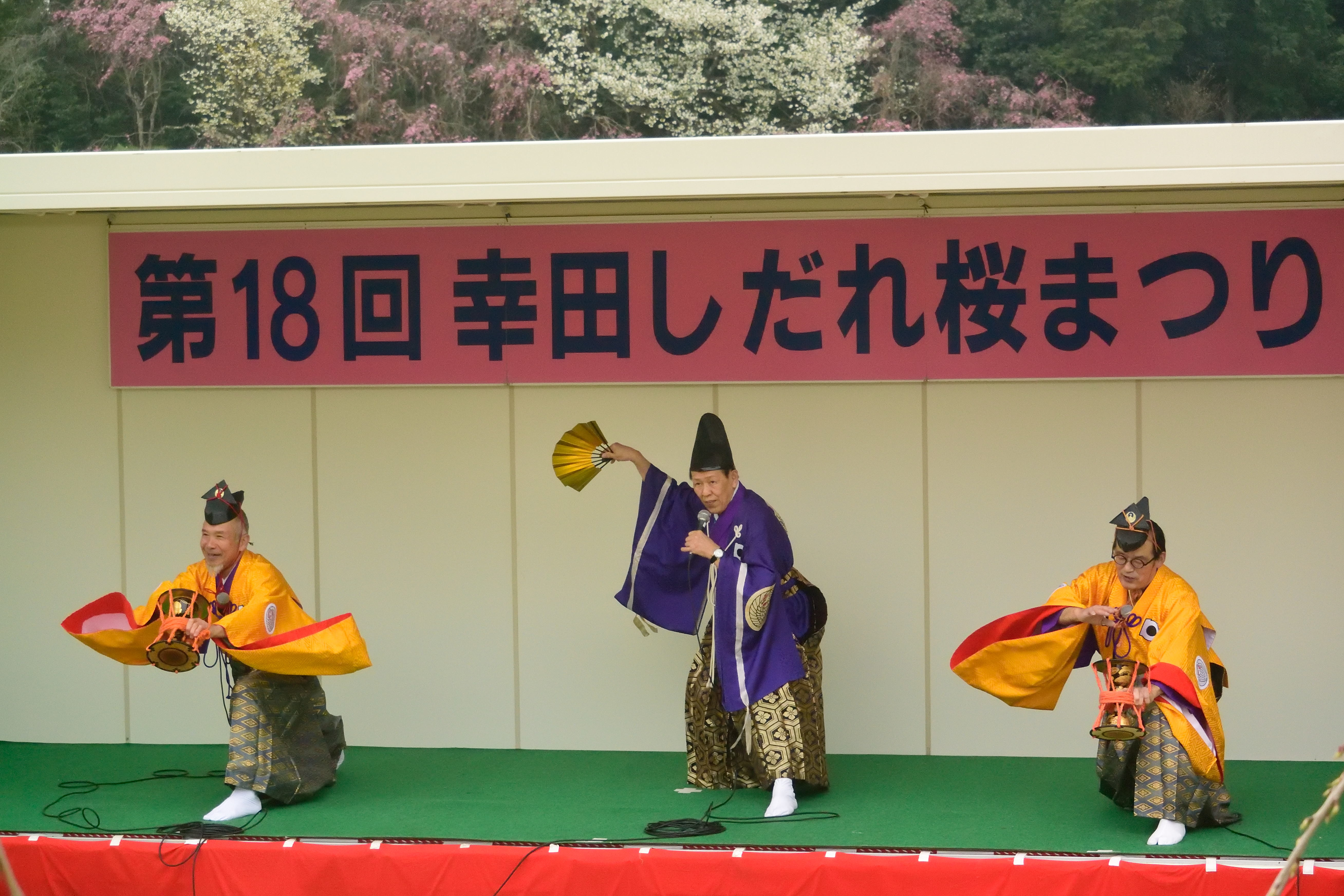 三河萬歳(2016年4月)